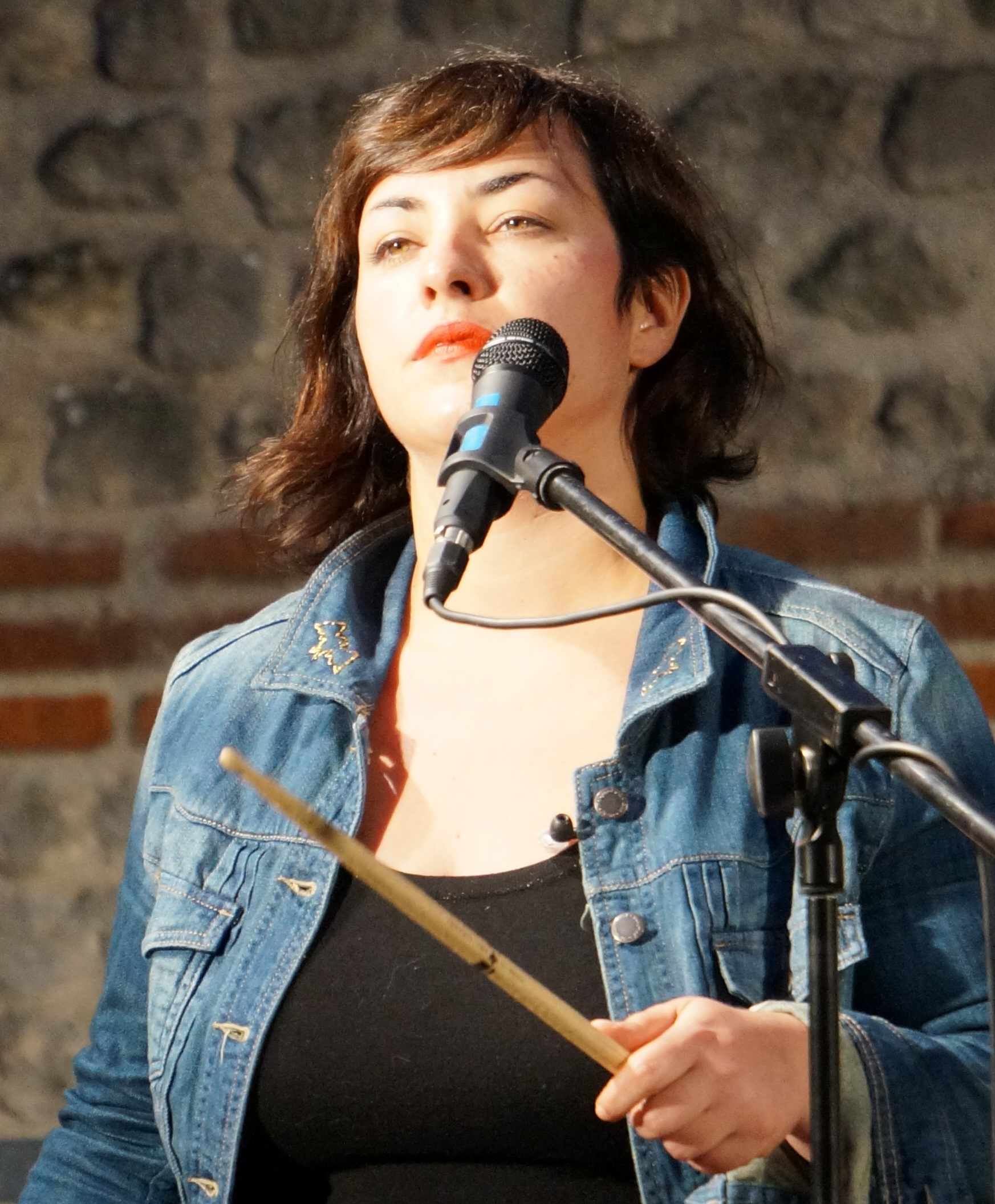 concert de cloture d'"Un été à Reims de 2013".